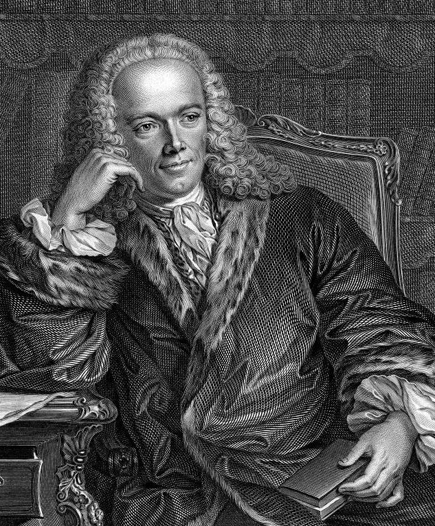 Portrait Francois Quesnay